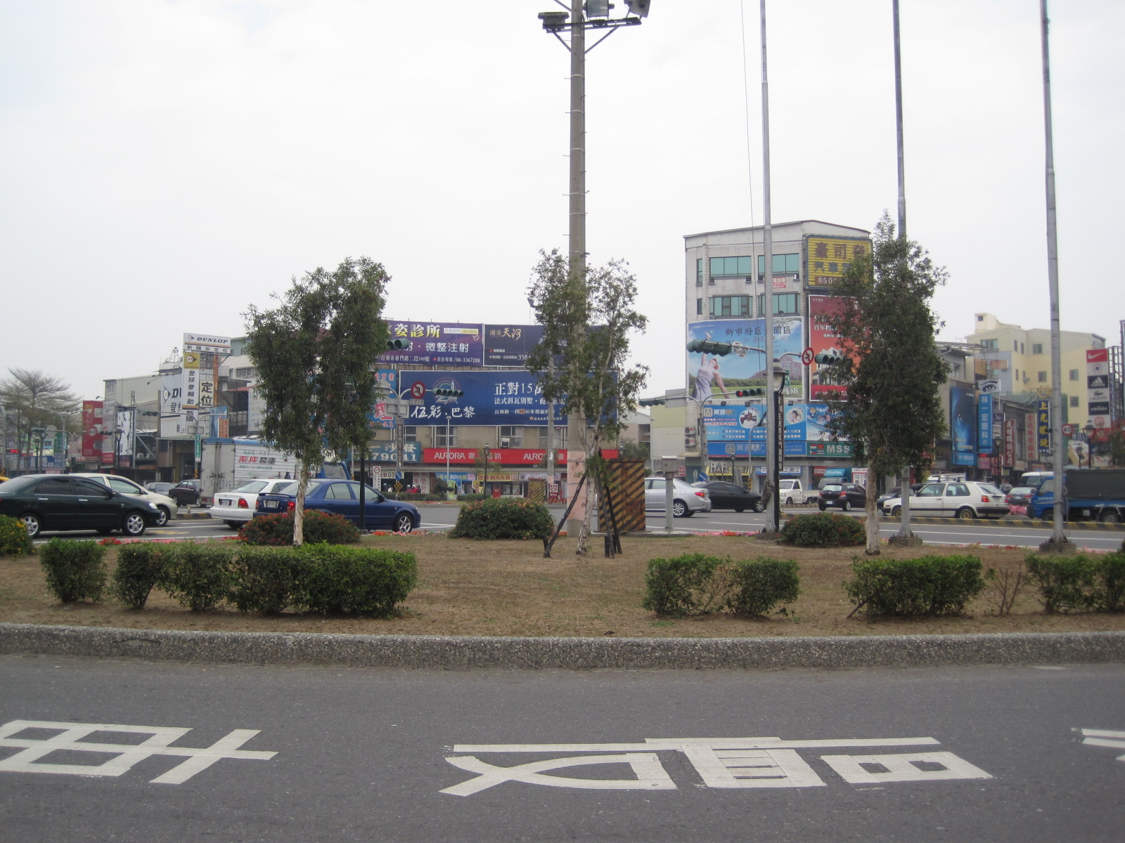 中文（台灣）: 臺南市東區後甲圓環。